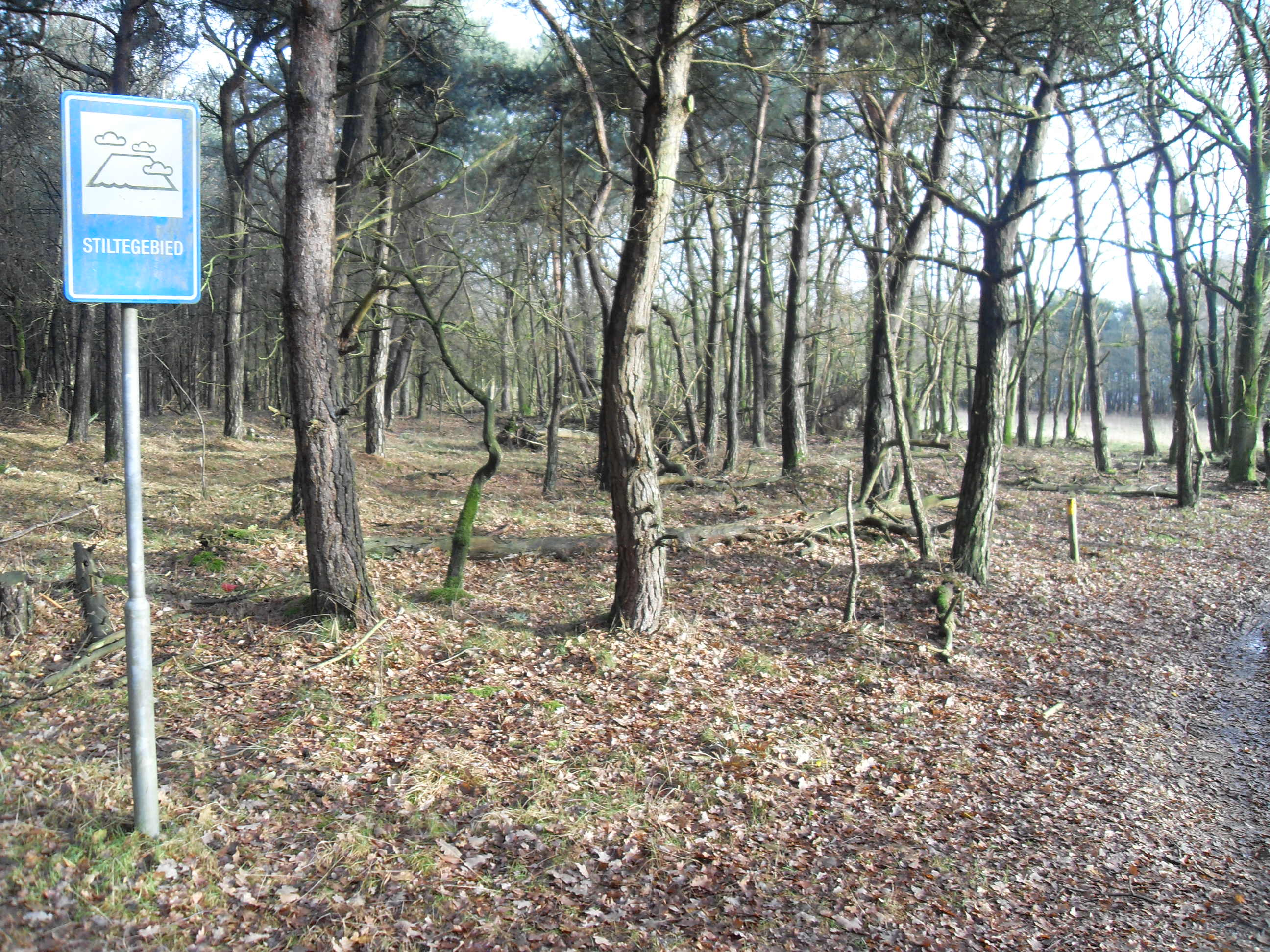 Maashorst, kanonsberg